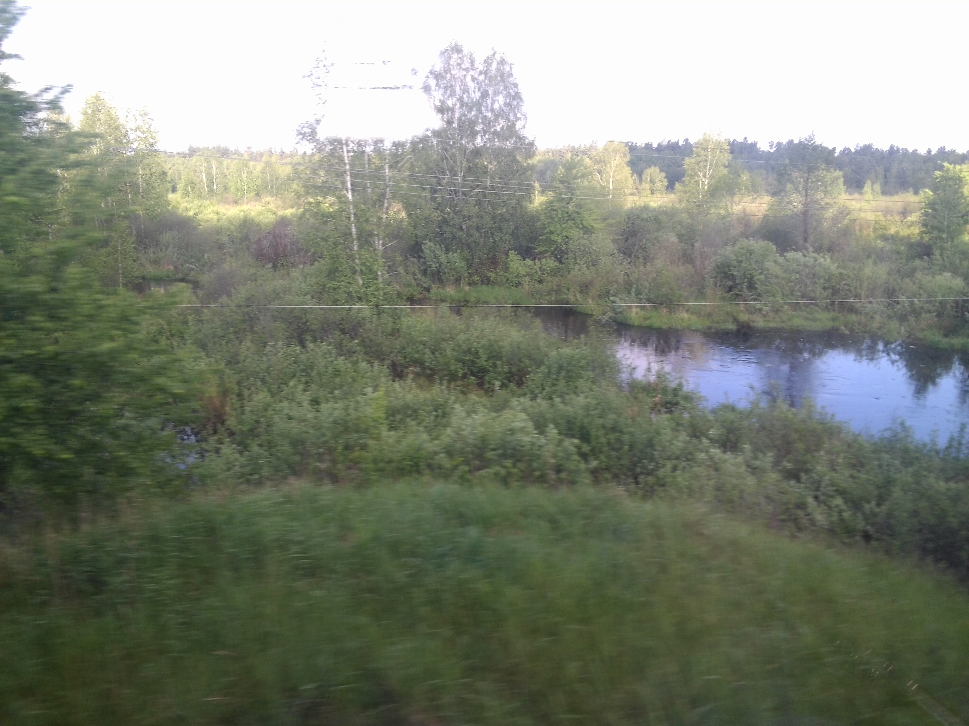 Річка Желонь на кордоні України та Білорусі (вид з залізничного моста)